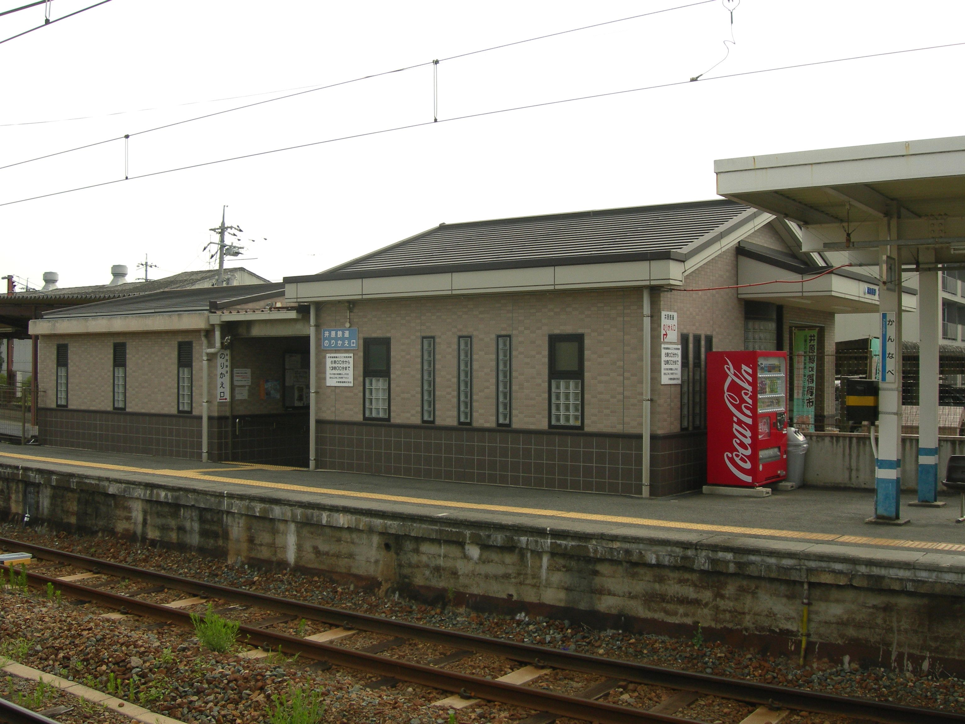 神辺駅、JRと井原鉄道の乗換え口